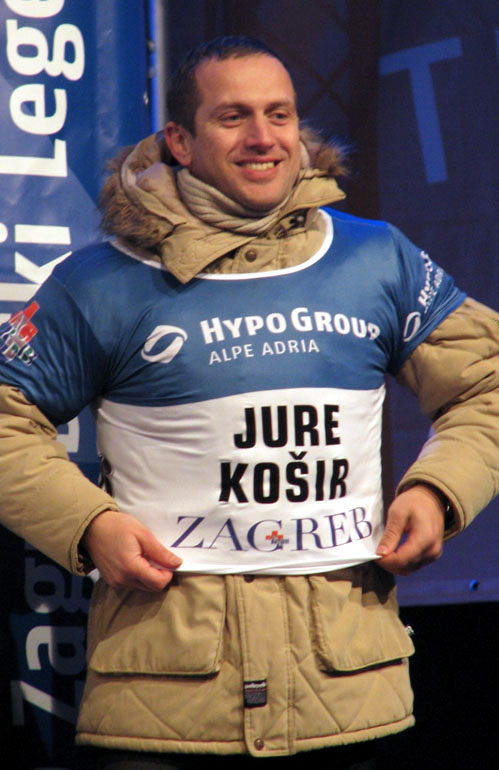 Jure Košir